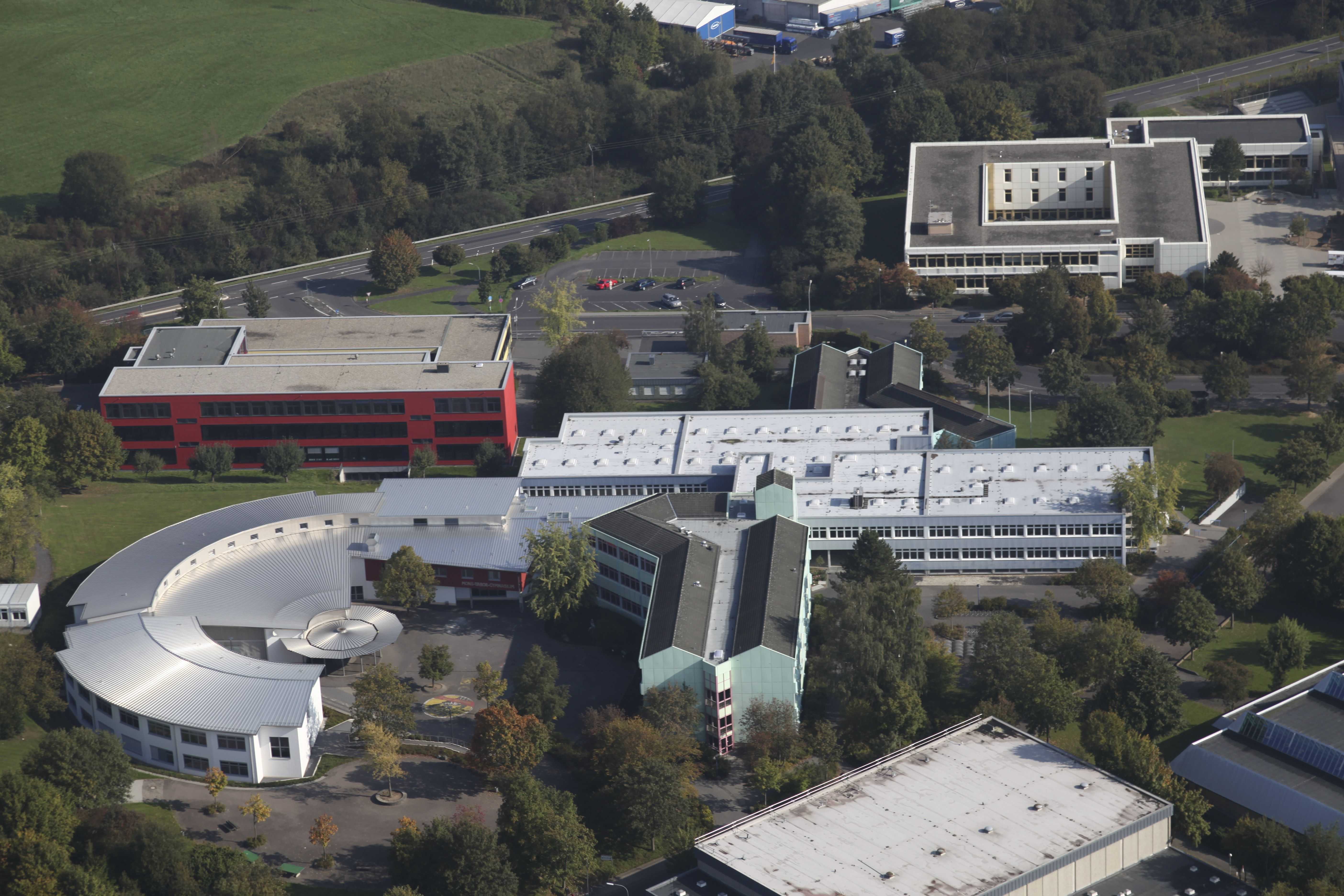 Luftaufnahme des Mons-Tabor-Gymnasiums aus dem Flugzeug von Familie Eggenberger